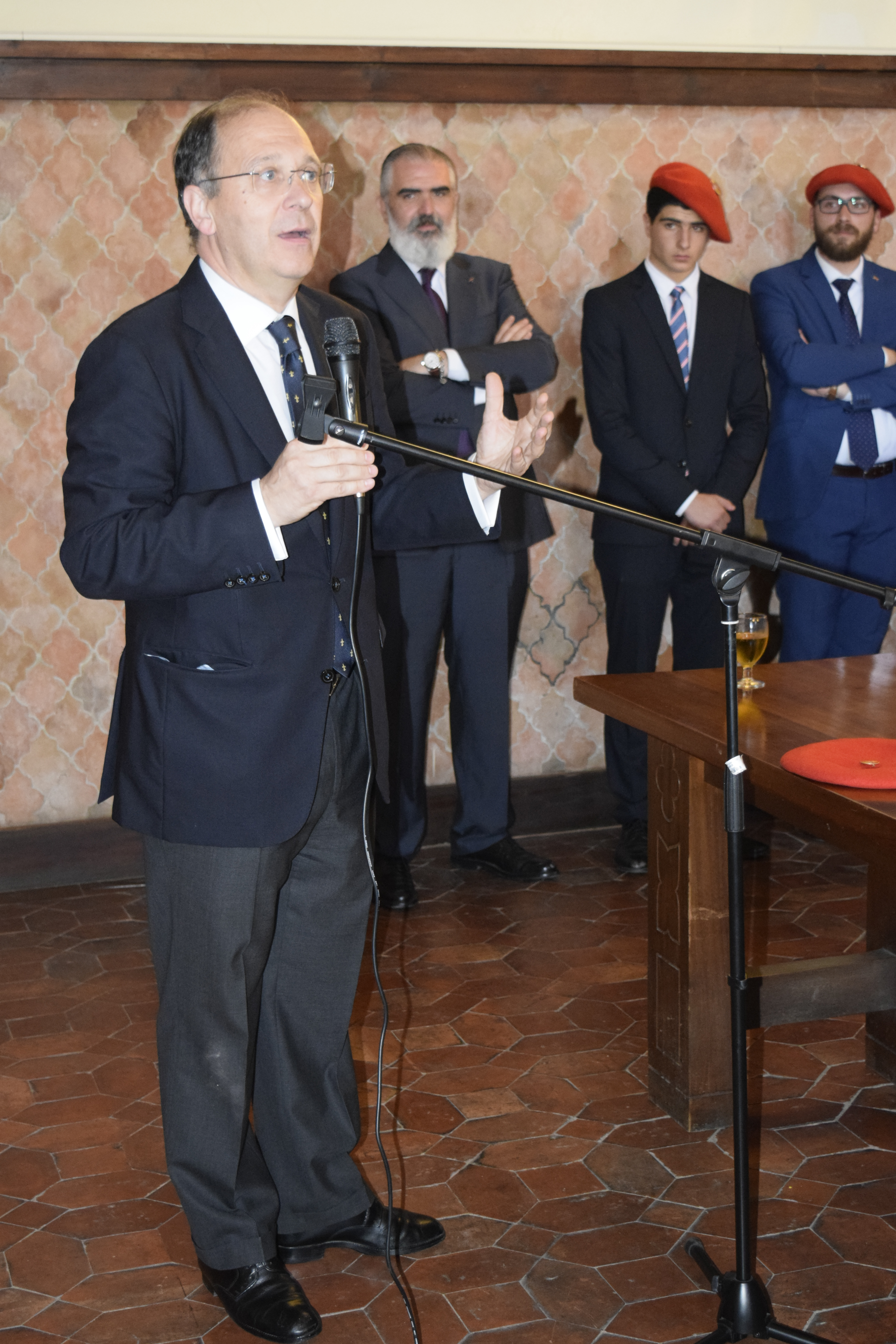 Durante el homenaje a S.M.C. D. Javier I, el Profesor D. Miguel Ayuso dirige la palabra a S.A.R. D. Sixto Enrique de Borbón y a los asistentes al acto.